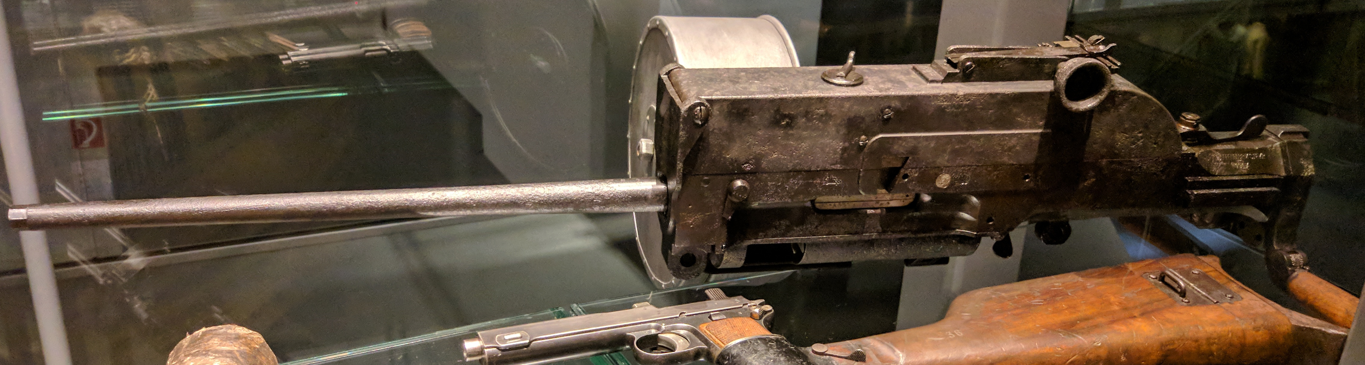 Letalska različica mitraljeza Schwarzlose